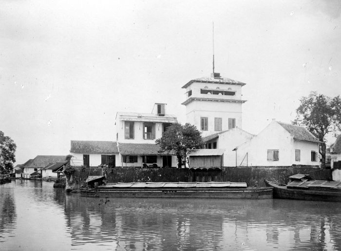 Repronegatief. De uitkijktoren op de pasar ikan, Batavia